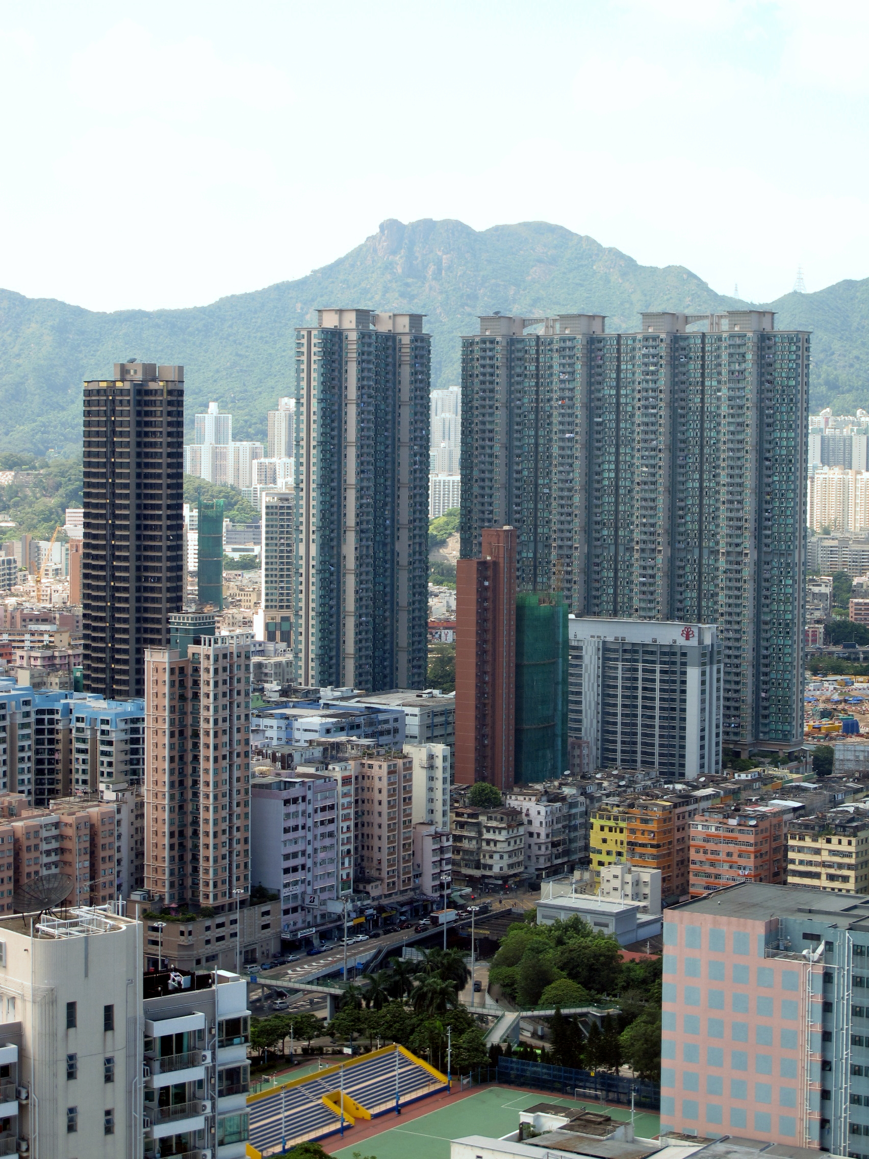 To Ka Wan Sky Tower